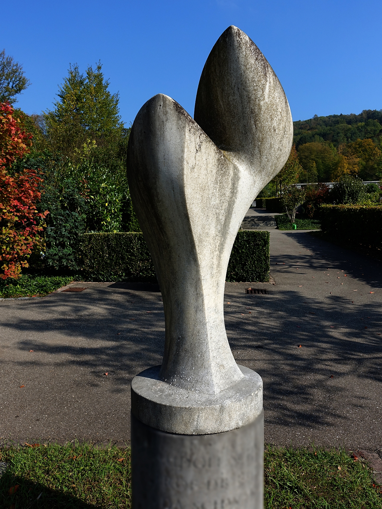 Hans Arp (1886–1966) Maler, Grafiker, Bildhauer, Lyriker. Grabskulptur 1953, ohne Titel, auf dem Friedhof am Hörnli, Riehen, Basel-Stadt Standort: 47°33'57.5"N 7°38'30.7"E, 47.565984, 7.641858